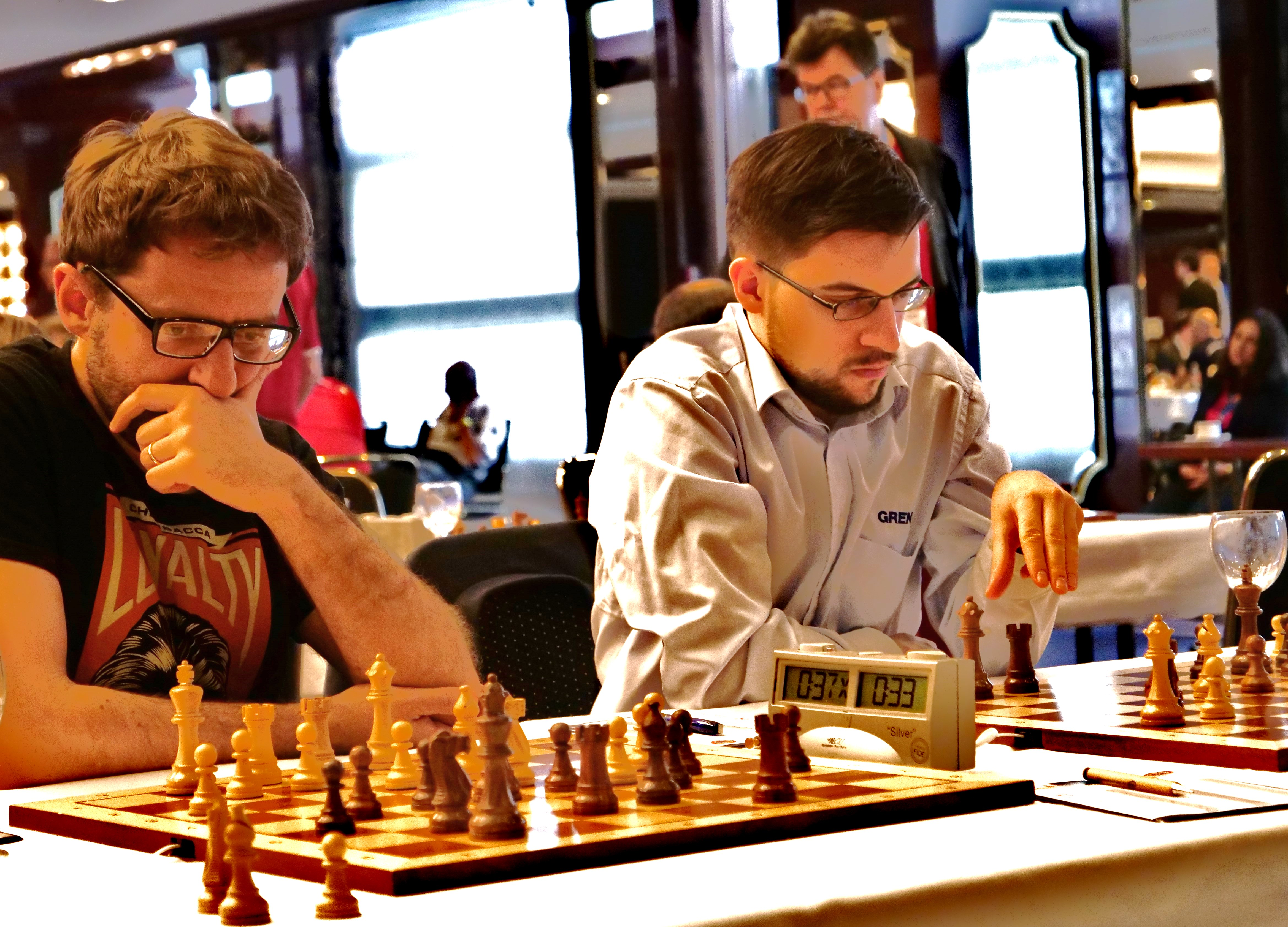 Aronjan und Vachier-Lagrave - Bundesliga-Endrunde Berlin 30-4-2018